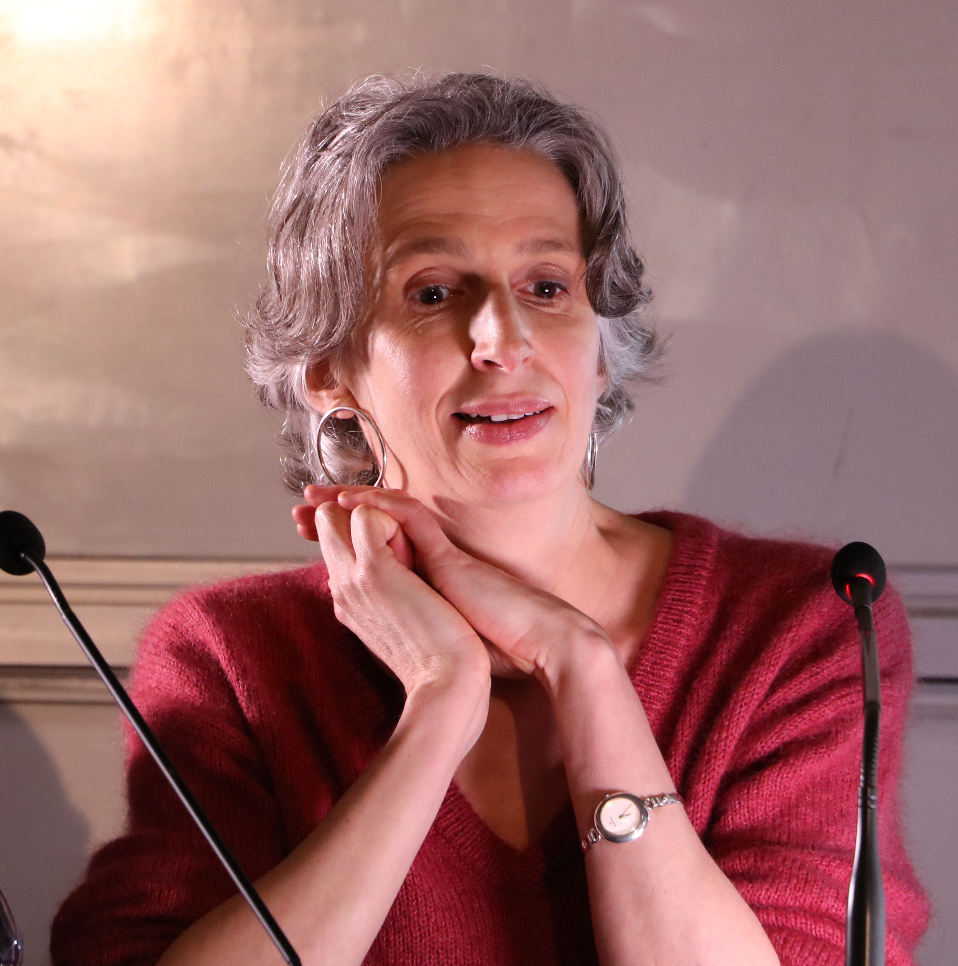 conférence de Mona Chollet à l'École des Beaux-Arts, à Paris le 28 janvier 2020